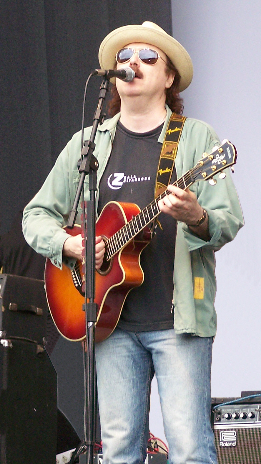 Fotografía de el cantante uruguayo Jaime Roos